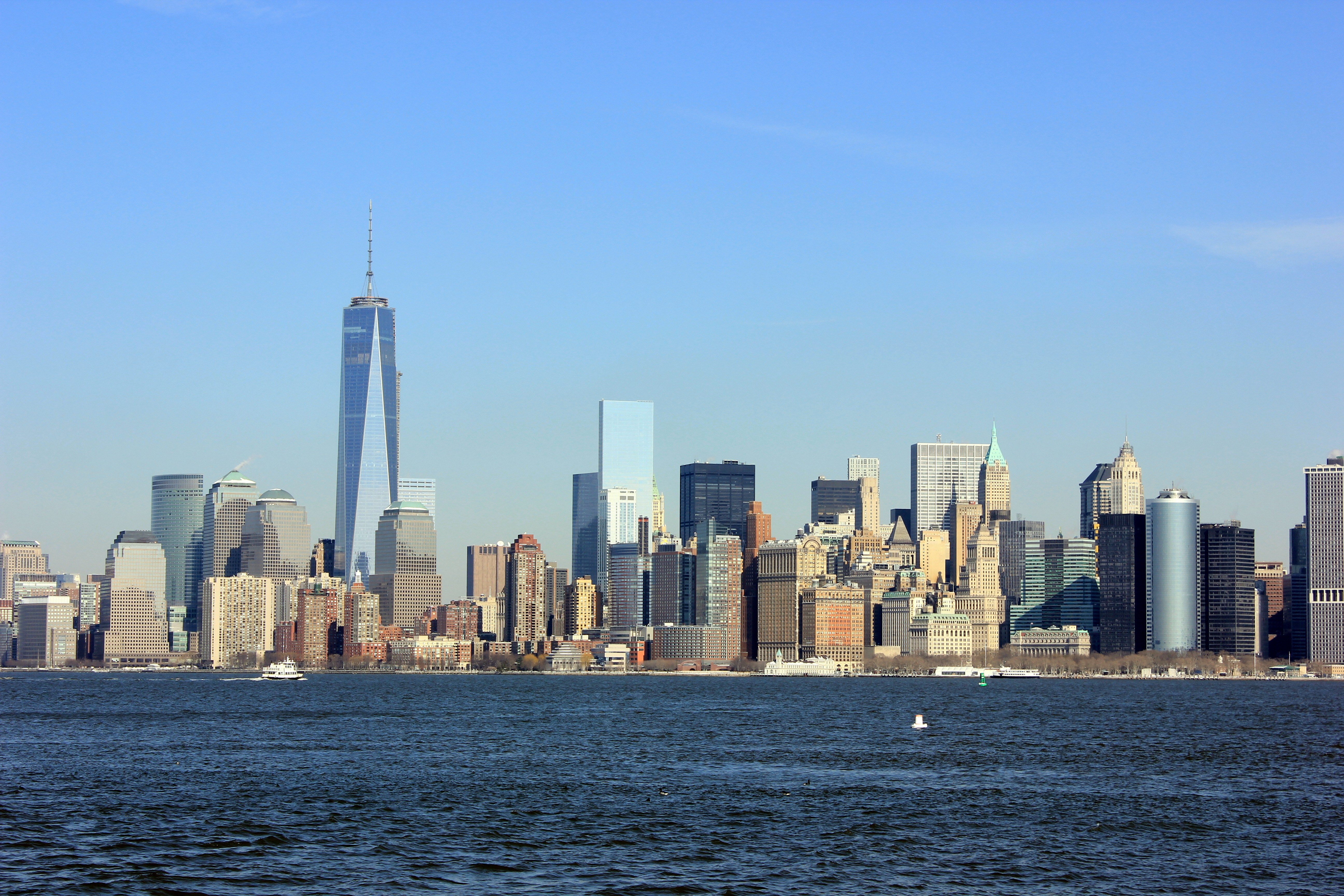 Manhattan Skyline